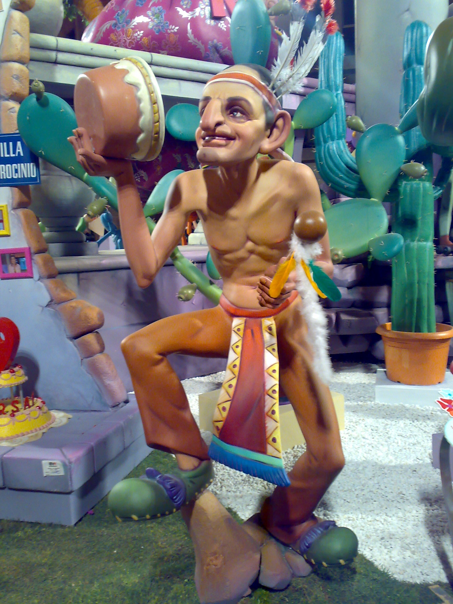 Un ninot de las Fallas de 2009 caricaturizando a Francisco Camps, ex presidente de la Generalitat Valenciana a 2009, con un traje indio.